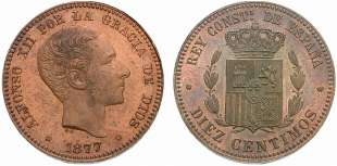 Moneda 10 centimos Alfonso XII